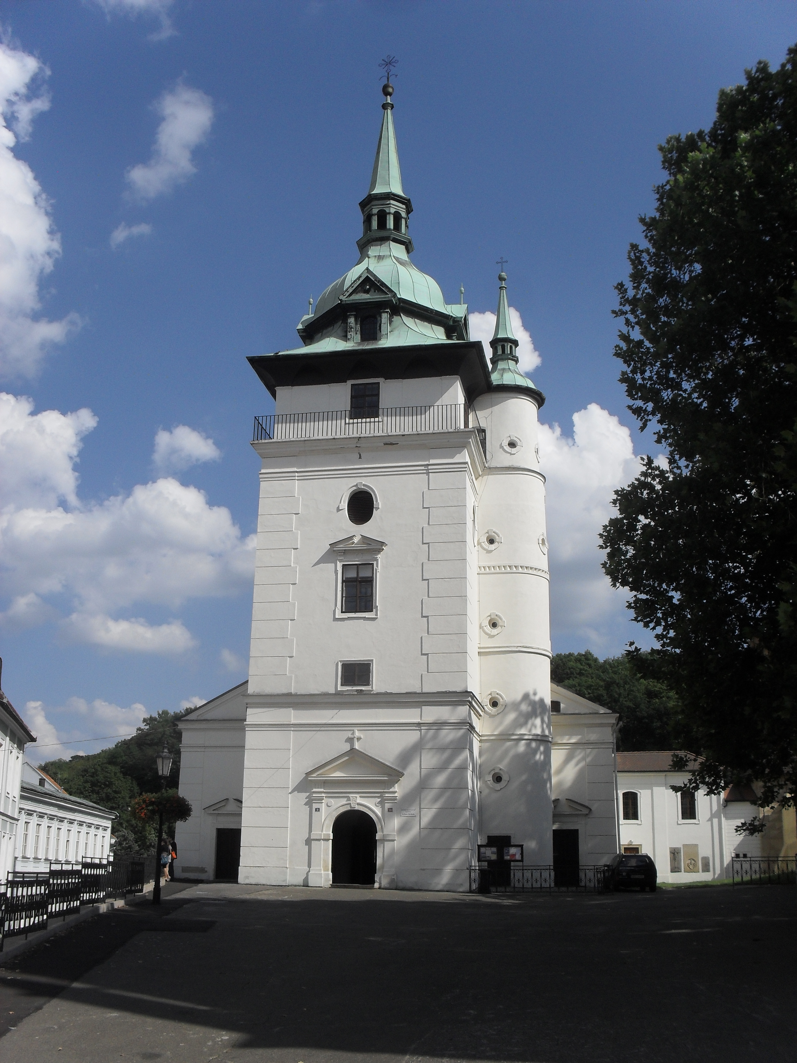 TTO: Kostel sv. Jana Křtitele (Teplice)- Teplice, Zámecké náměstí 135.